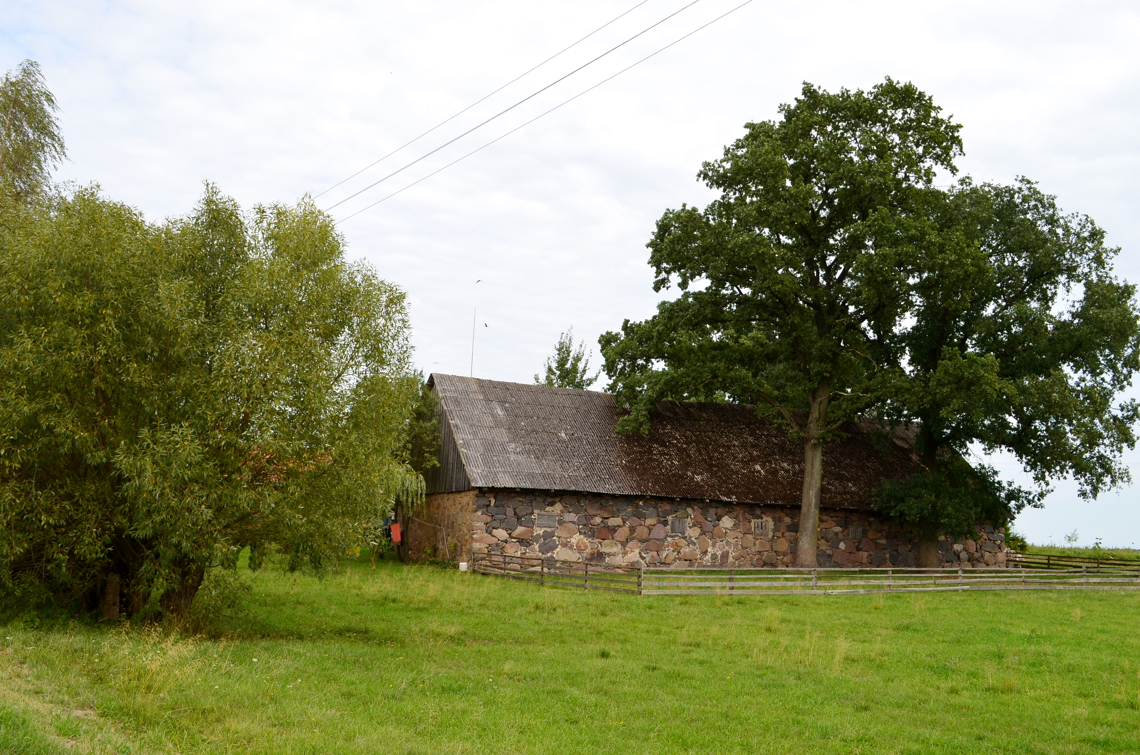 Geisteriškiai, Bartninkų sen., Vilkaviškio raj.